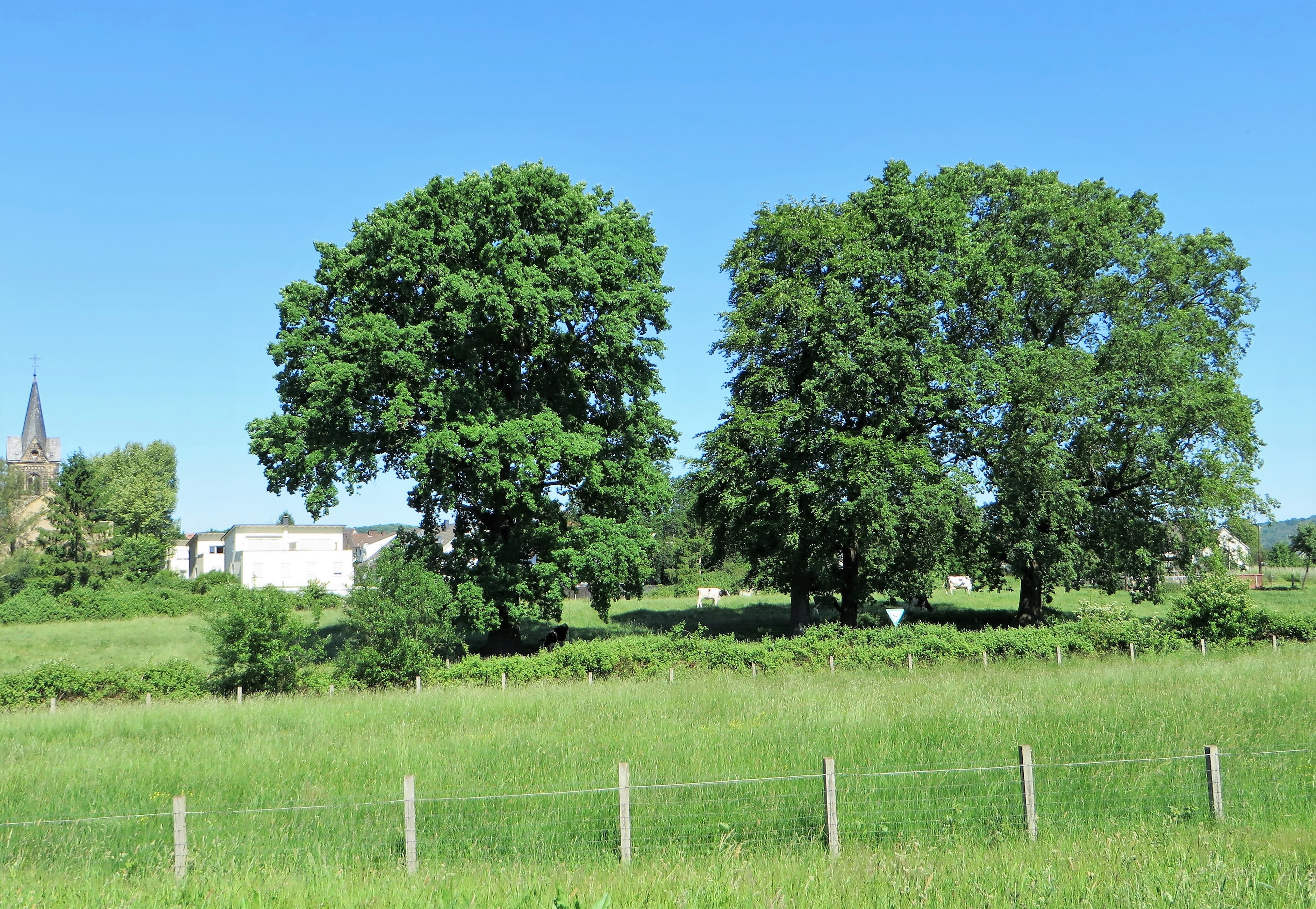 Geschützter Landschaftsbestandteil 1.4.2.10 „Baumreihe Lammer´s Siepen“ in Hagen-Boele. Es handelt sich um eine Baumreihe bestehend aus drei Stieleichen und zwei Buchen, die auf einer Weide entlang des Siepens an der Malmkestraße stehen. Stammumfang ca. 2,30 bis 3,70 m, Kronendurchmesser ca. 14 bis 26 m, Höhe ca. 18 bis 20 m.